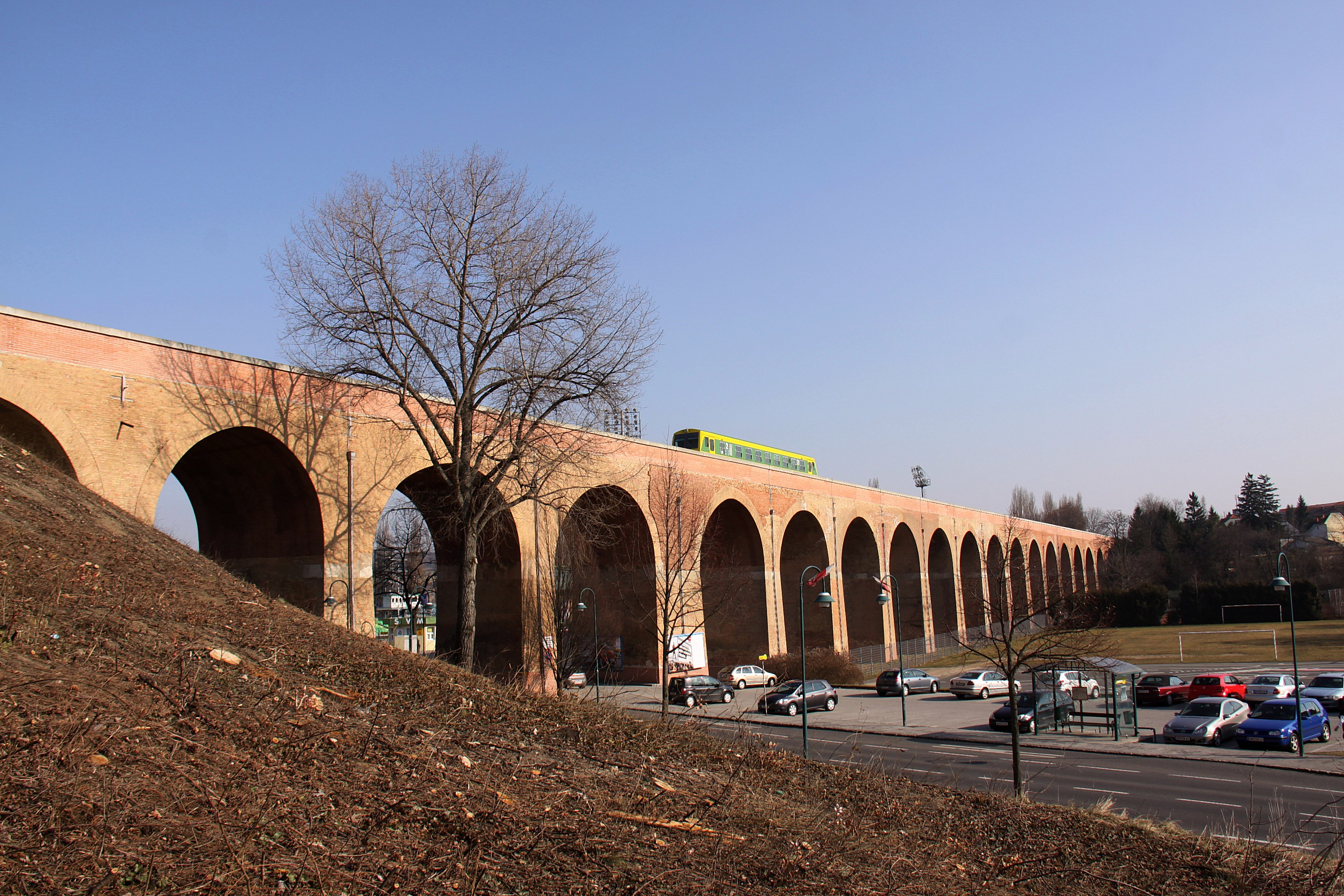 Talviadukt der Mattersburger Bahn - Mattersburg.